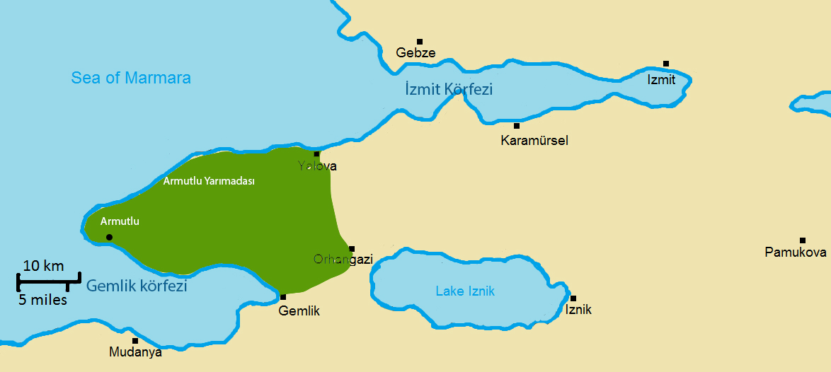 Armutlu yarımadası haritası.